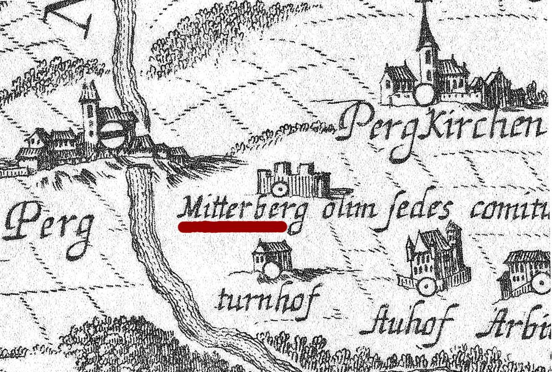 Detail der Landkarte 1667 mit Burgruine Mitterberg in Gemeinde Perg in Oberösterreich (Austria). Text: Mitterberg olim sedes comitum de Mahlant (vor Zeiten Sitz derer von Machland)